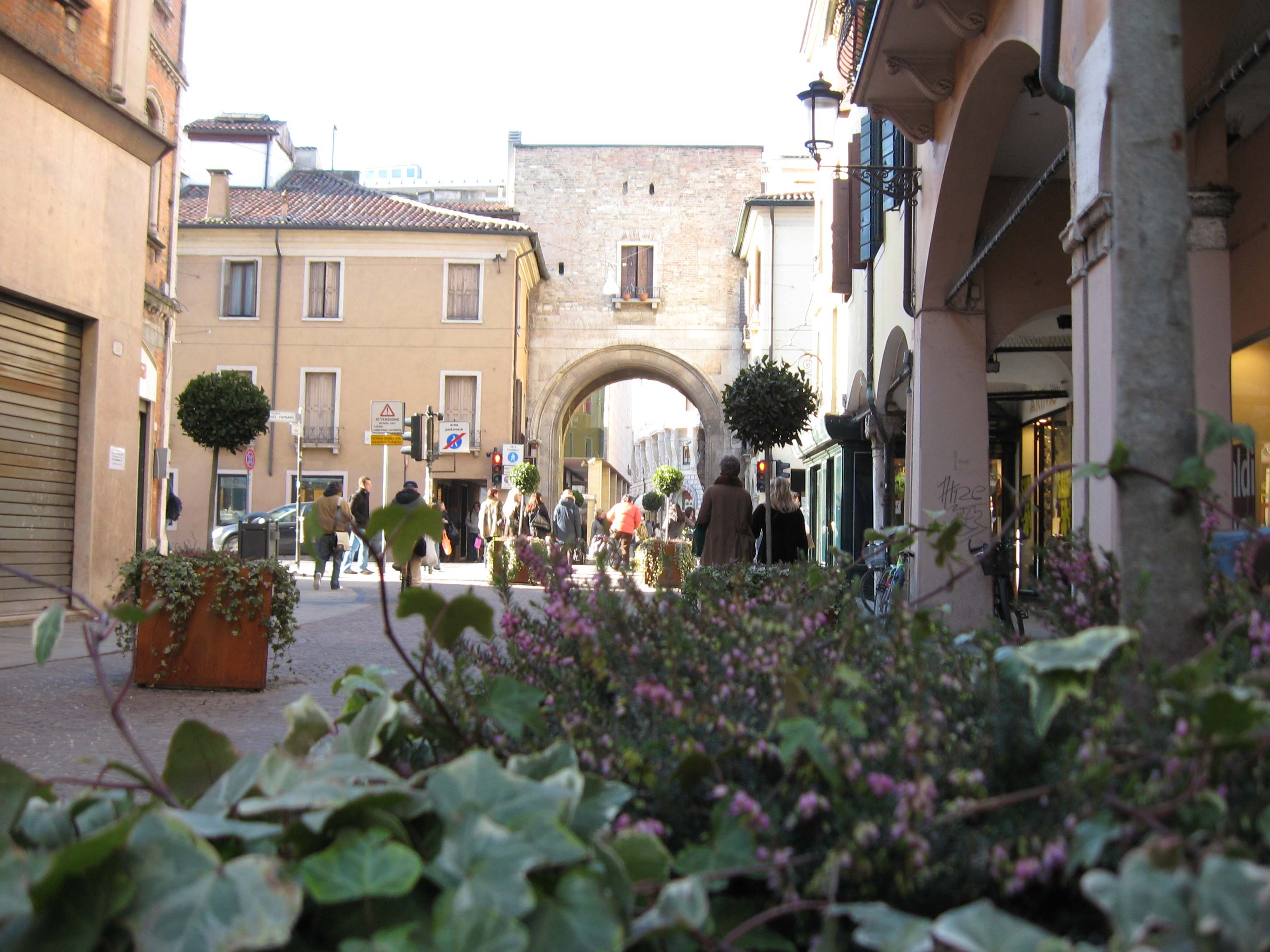 Porta Altinate